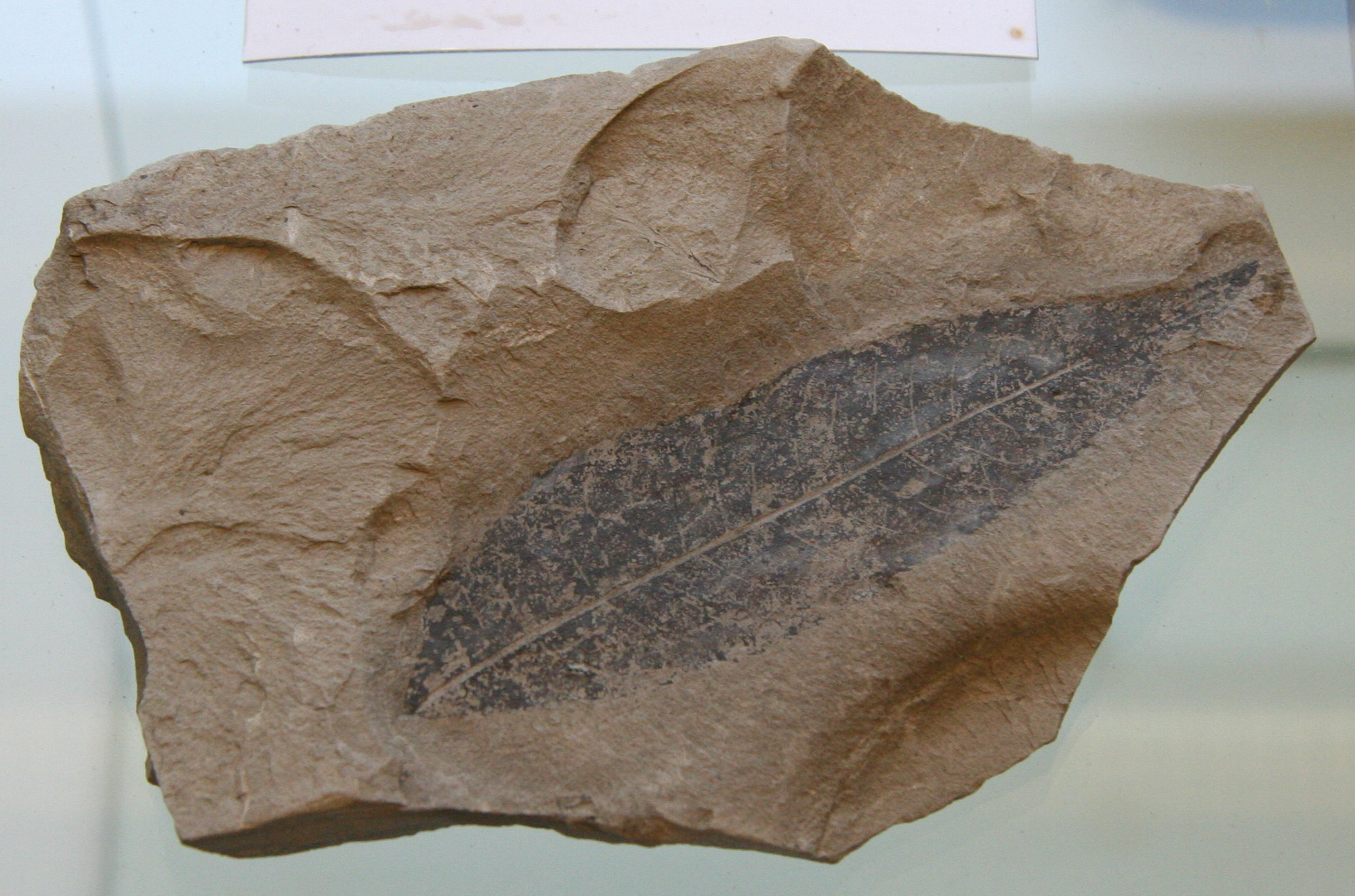 fossiles Blatt von Carya serrifolia im Botanischen Garten Dresden